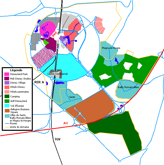 Schéma du domaine de Disneyland Resort Paris.